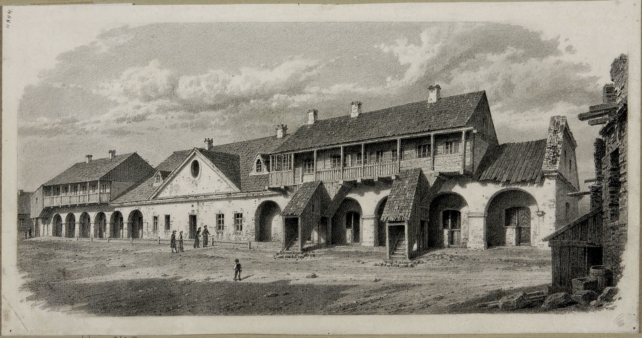 Беларуская (тарашкевіца): Бераставіца Вялікая (Bierastavica Vialikaja). Ратуша